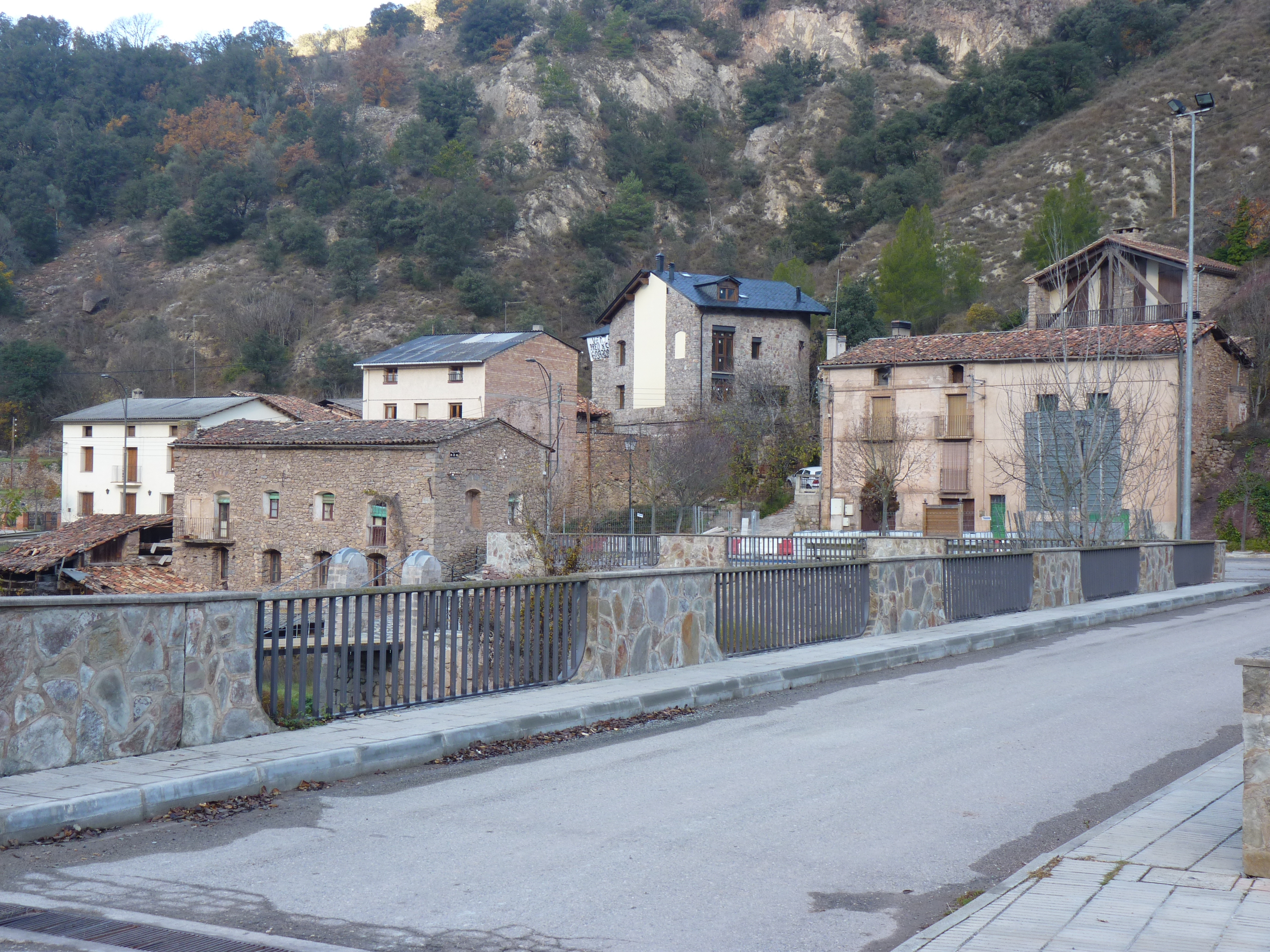 Poble de Baro (Pallars Sobirà) des del Pont d'Arcalís